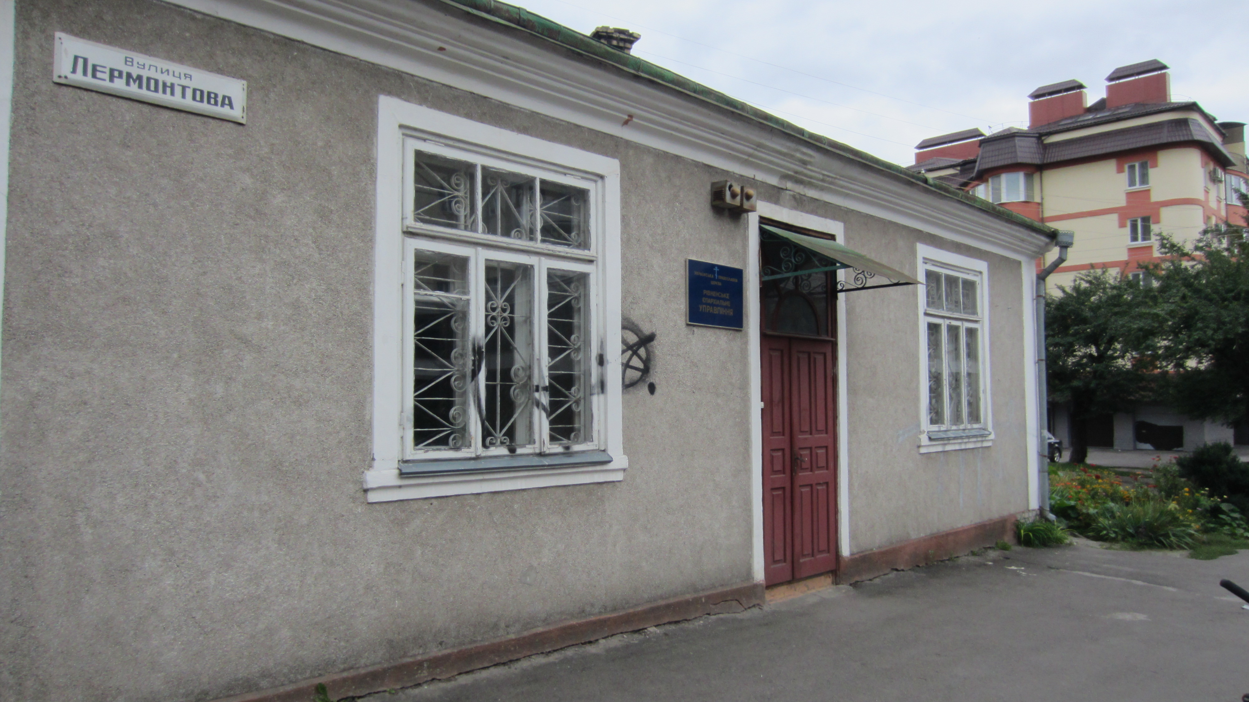 Будинок, з якого був викрадений розвідником Героєм Радянського Союзу М. І. Кузнєцовим фашистський генерал фон Ільгєн, Рівне, вул. Лєрмонтова, 3